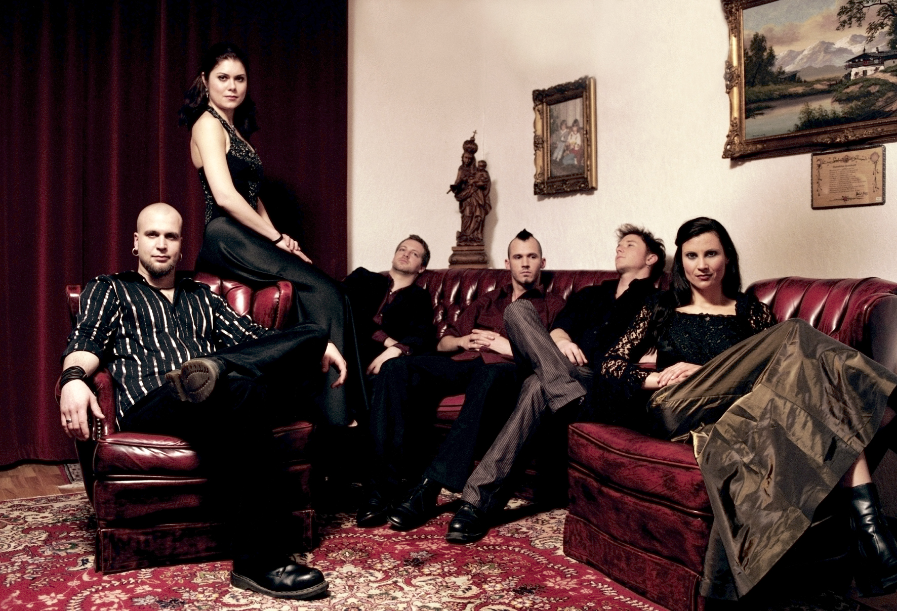 German Band "Schandmaul"; (from the left to the right): Thomas Lindner, Anna Katharina Kränzlein, Martin Duckstein, Matthias Richter, Stefan Brunner, Birgit Muggenthaler